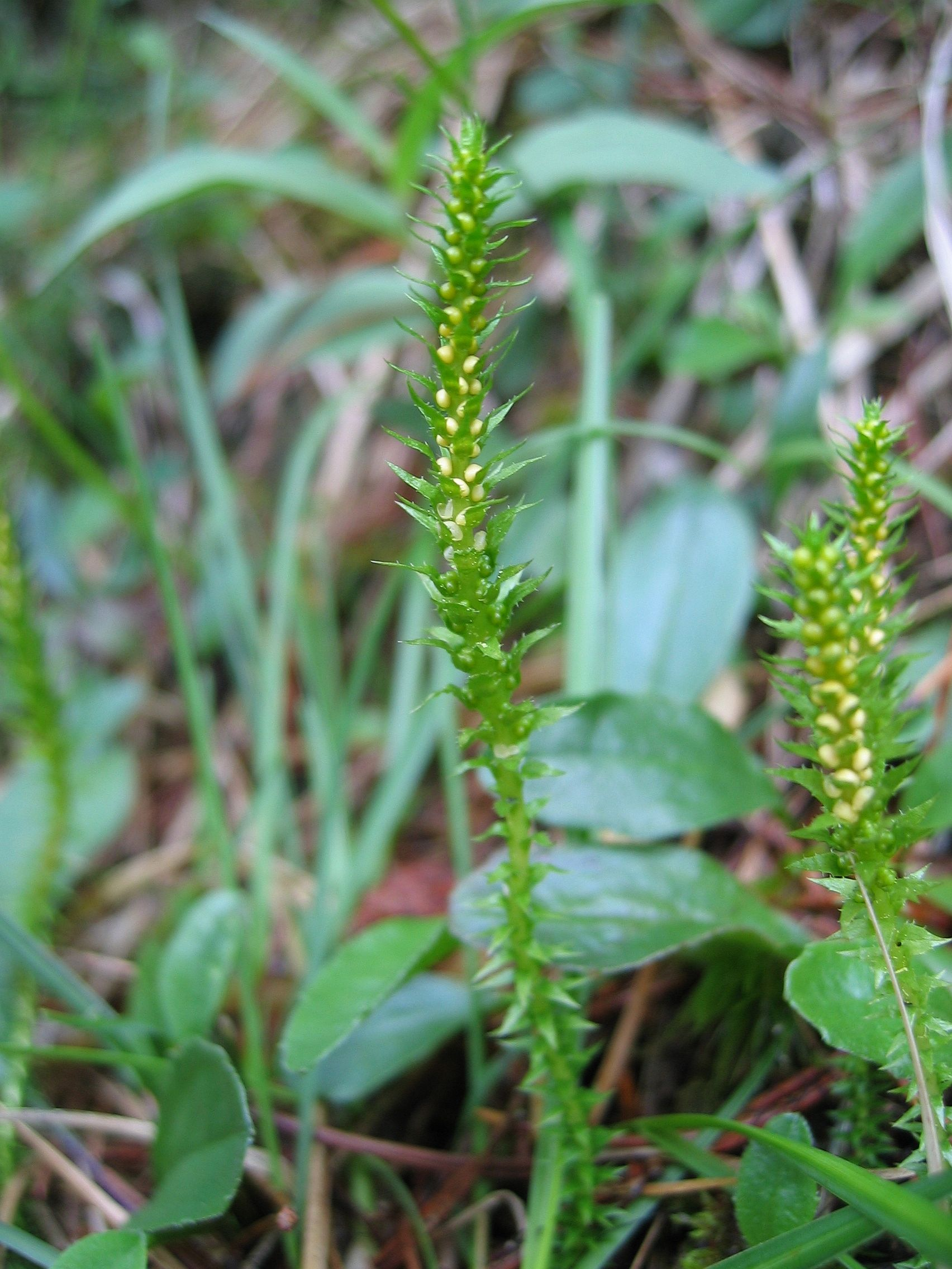 Selaginella selaginoides, Grieskar, Upper Austria, Austria